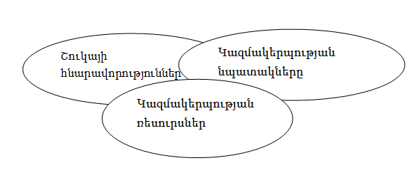 Նպատակների, ռեսուրսների և շուկայական հնարավորությունների հարաբերությունները